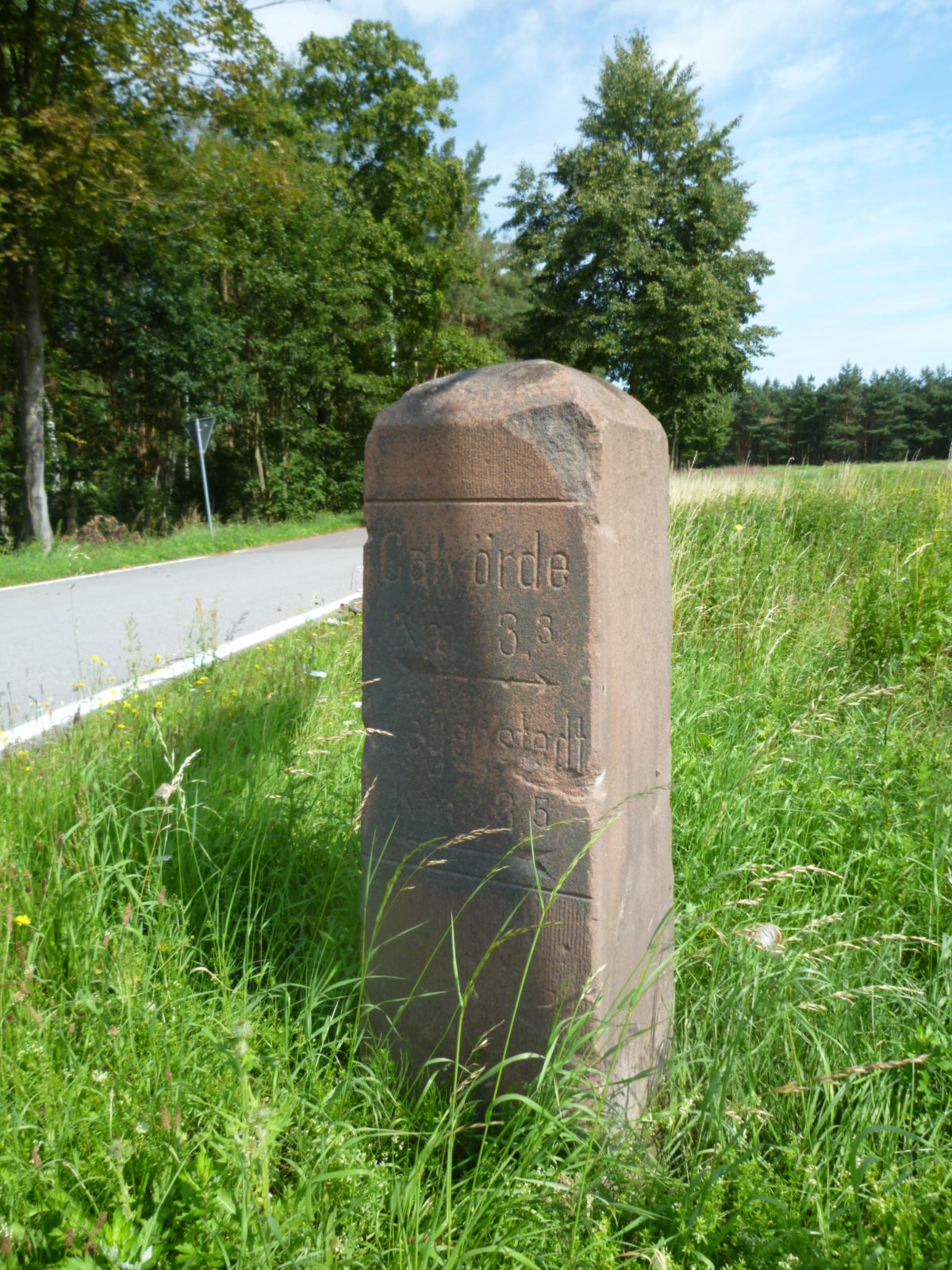 Wegweiser in Calvörde, L24 Kreuzung Calvörde-Velsdorf-Wegenstedt 1